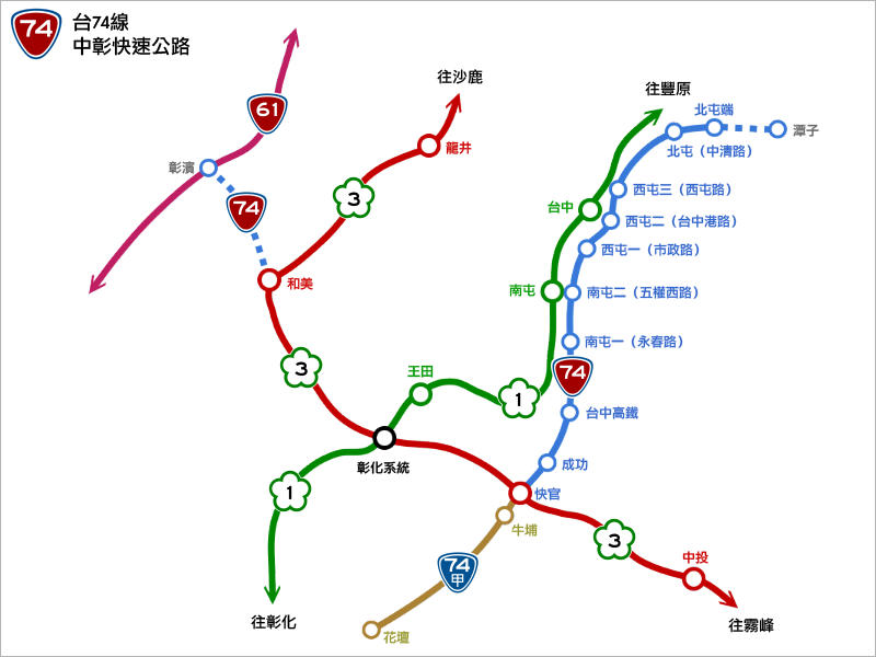 台74線中彰快速公路路線圖